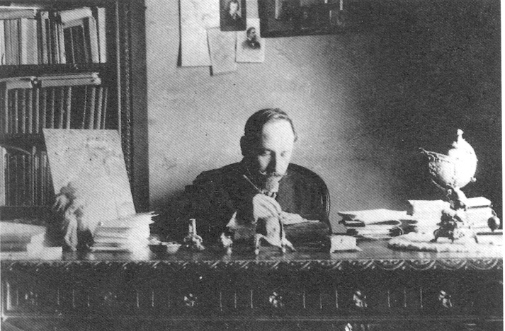 Luigi Pirandello a quarant’anni, mezzo calvo, con la barba quasi tutta bianca, perduti gli averi; distrutta la casa, lontano dai figli.